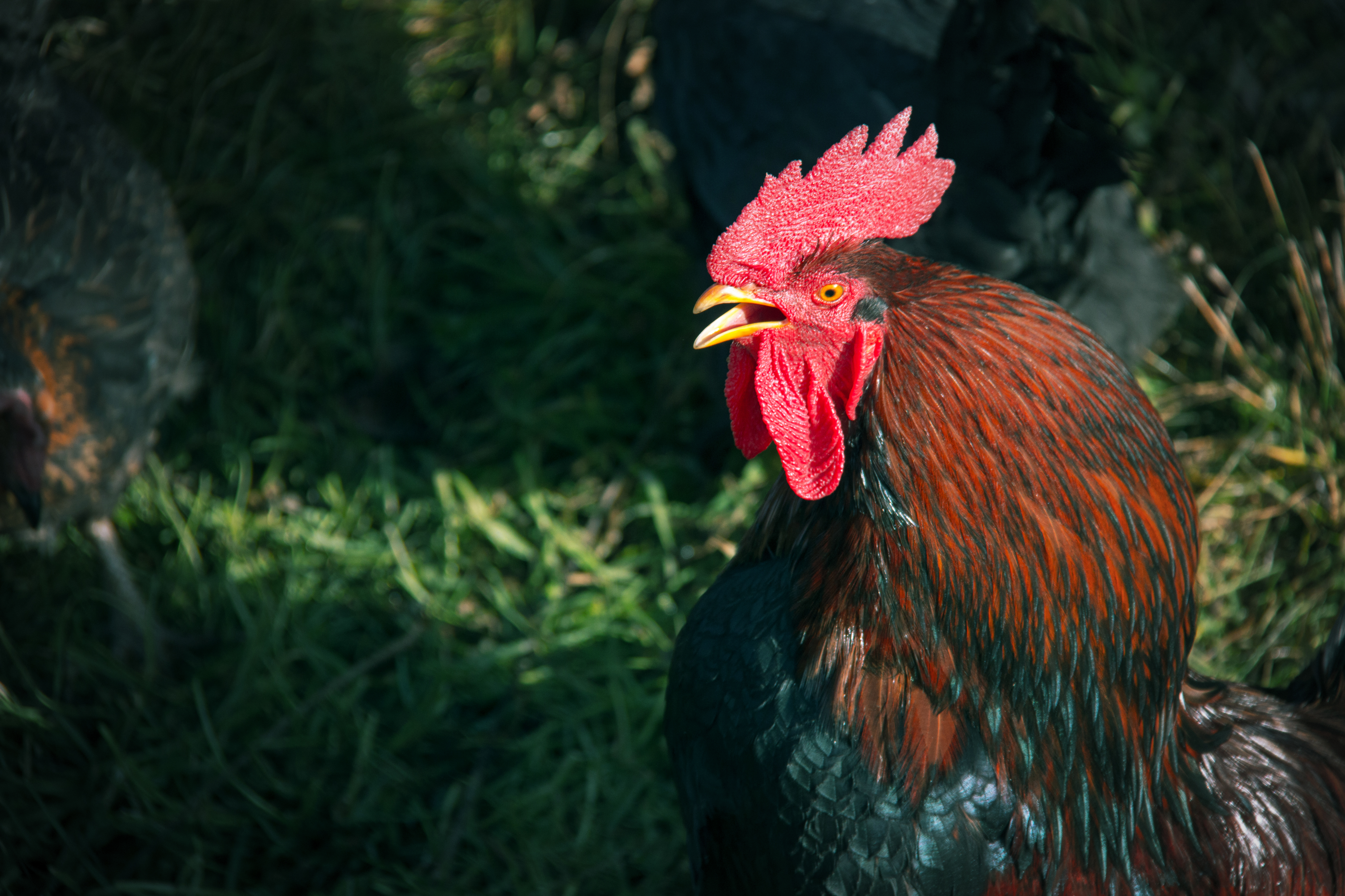 Verkhovyna, Ucrania